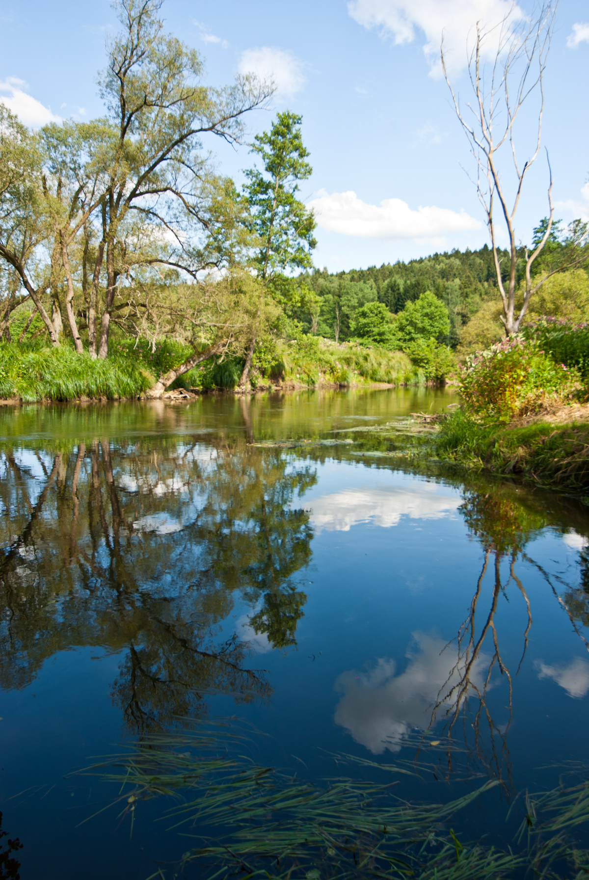 řeka Ohře u Kynšperku n. Ohří